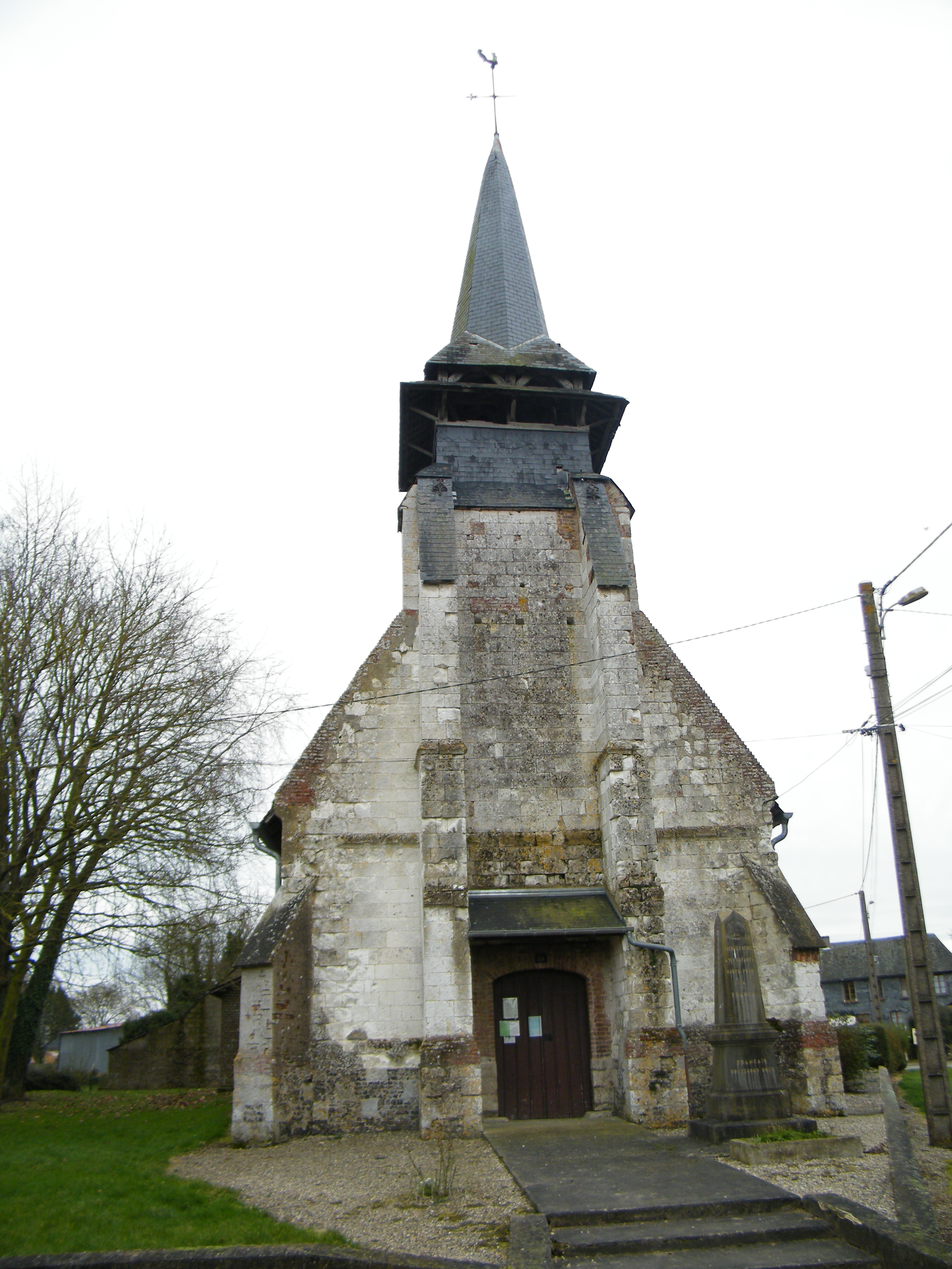 Grébault-Mesnil, Somme, Fr, le clocher de l'église.